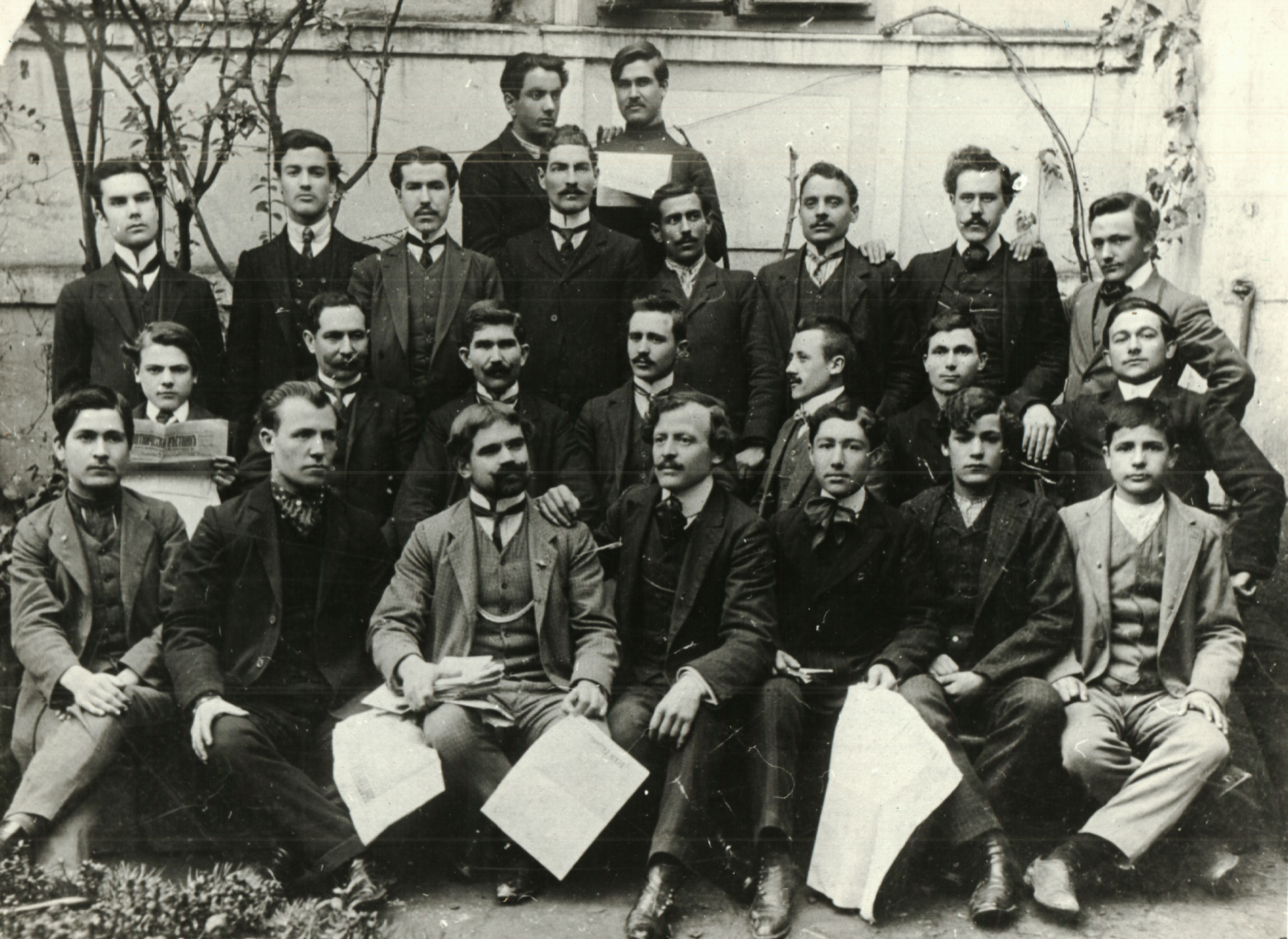 ССиндикат на печатарите работници в Солун, 1910 г.